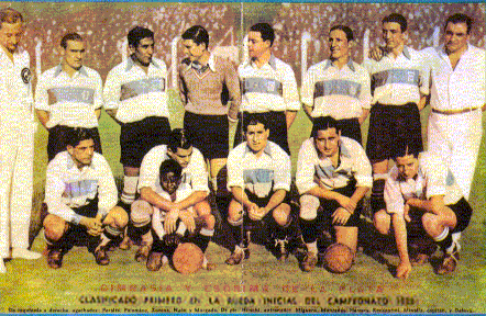 Una foto del Plantel del Club de Gimnasia y Esgrima La Plata, posando en 1933. En esa temporada fue apodado "El Expreso".